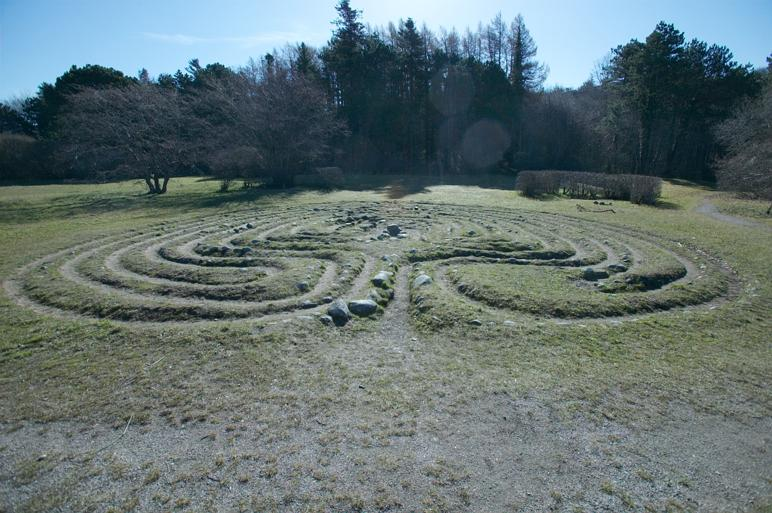 RAÄ-nummer Visby 25:1. Trojaborg, labyrintisk stensättning nedanför Galgberget på S:t Görans området.